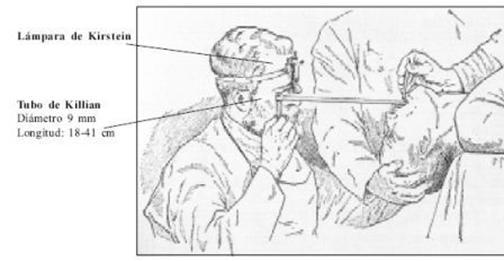 Brochoskopie nach Gustav Killian mit einer Lampe nach Alfred Kirstein.